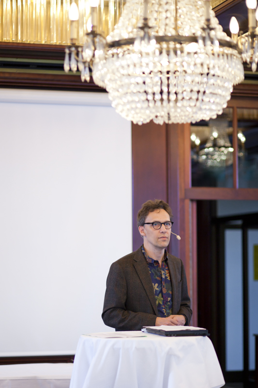 Joacim Hansson, Växjö 2014